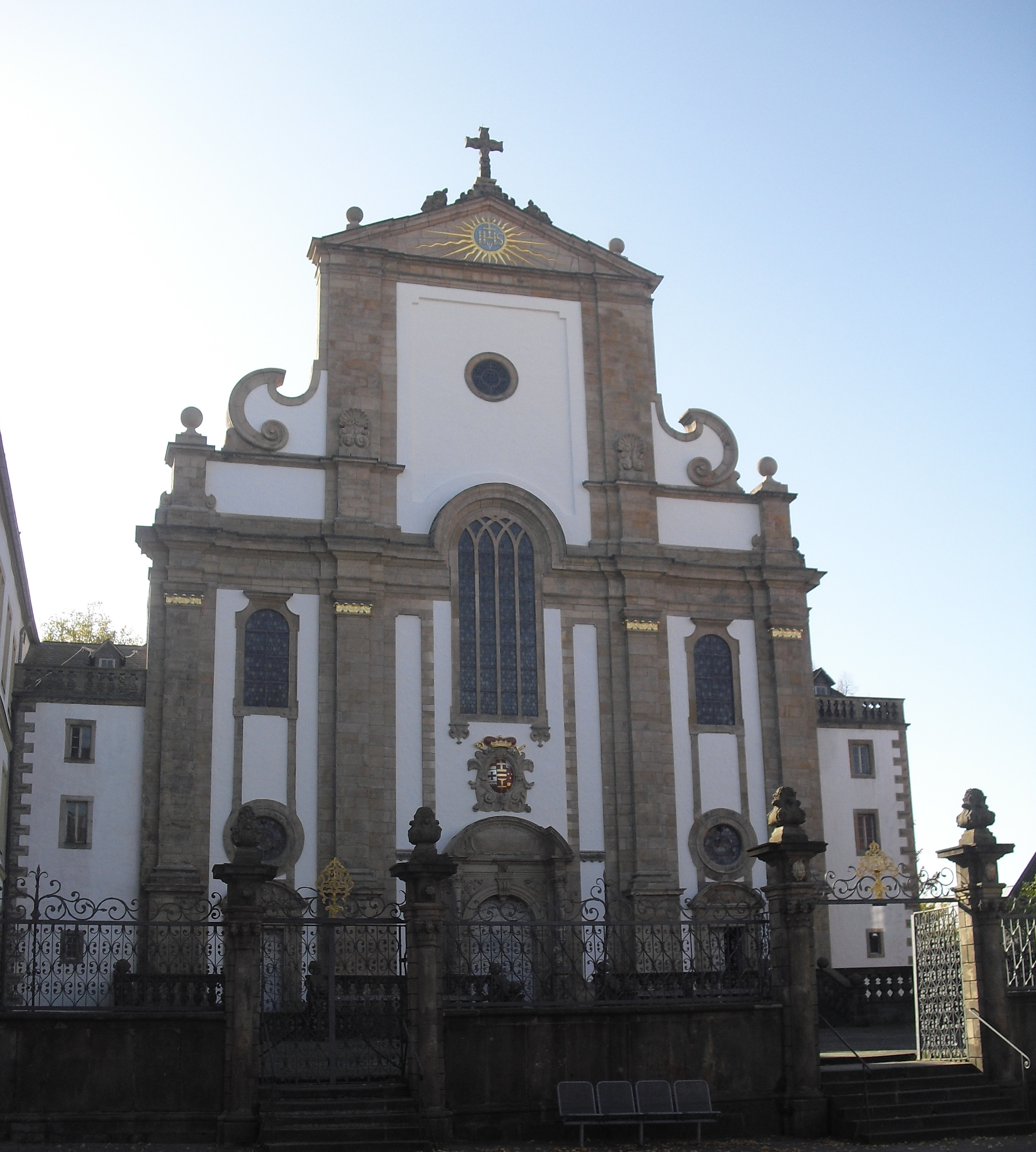 Marktkirche in Paderborn